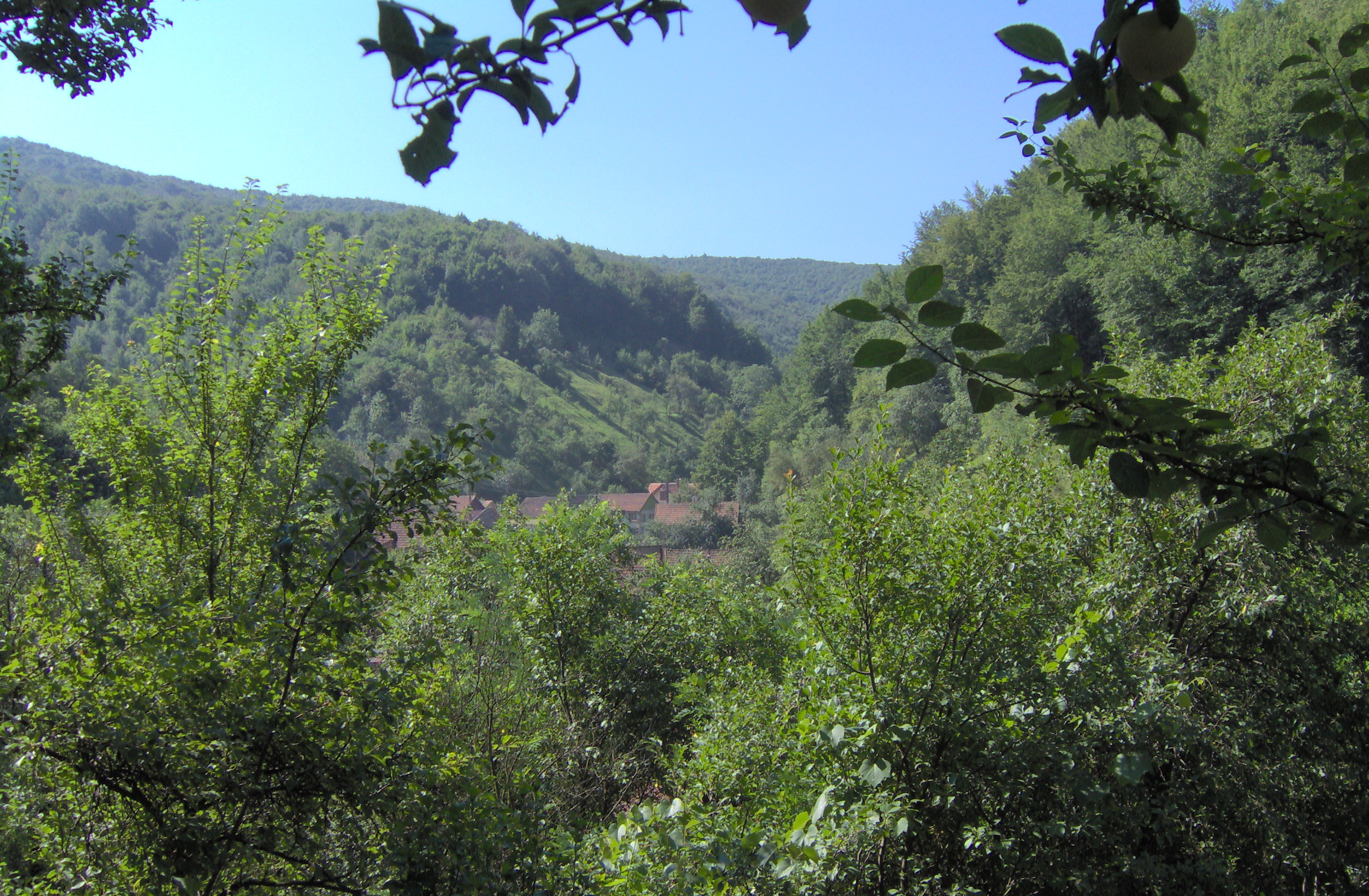 Ocna de Fier vazuta de pe un deal din apropiere